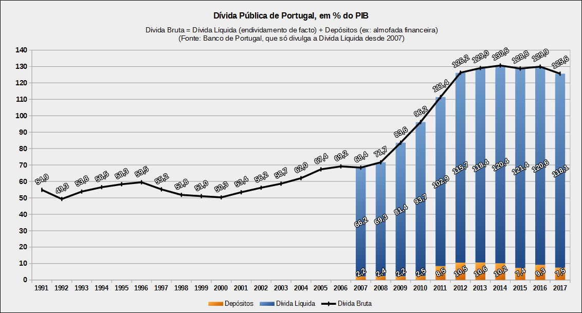 Linha preta descreve evolução da Dívida Pública Bruta de Portugal, em % do PIB. As barras azuis tem o valor da Dívida Pública Líquida de Portugal, publicada desde 2007 pelo Banco de Portugal. E a laranja está o valor dos Depósitos em % do PIB, ou seja, empréstimos que se pediram e que não são usados, como por exemplo a almofada financeira.